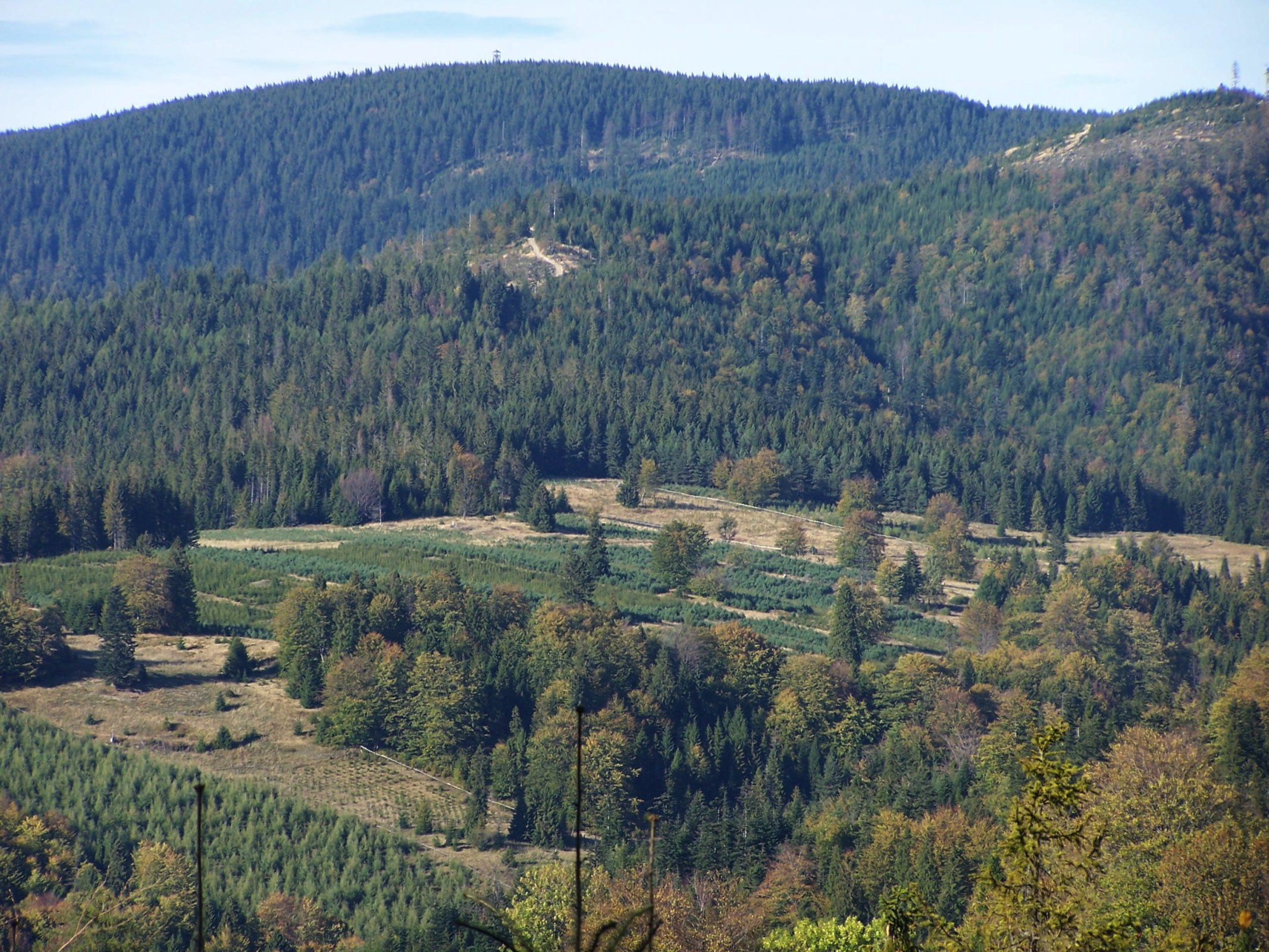 Masyw Radziejowej (Beskid Sądecki). Widok na Radziejową i Małego Rogacza